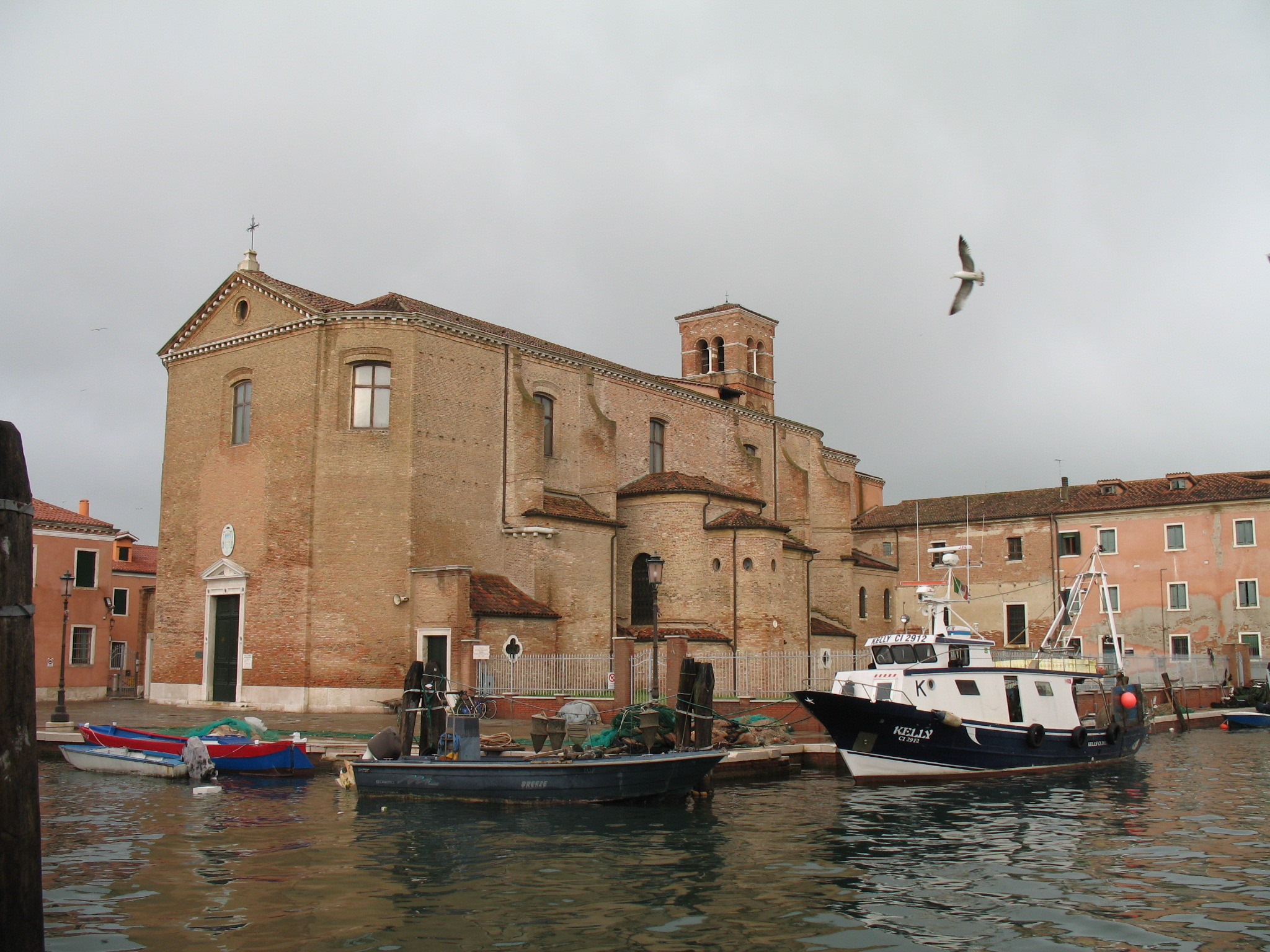 Chioggia, laguna veneta